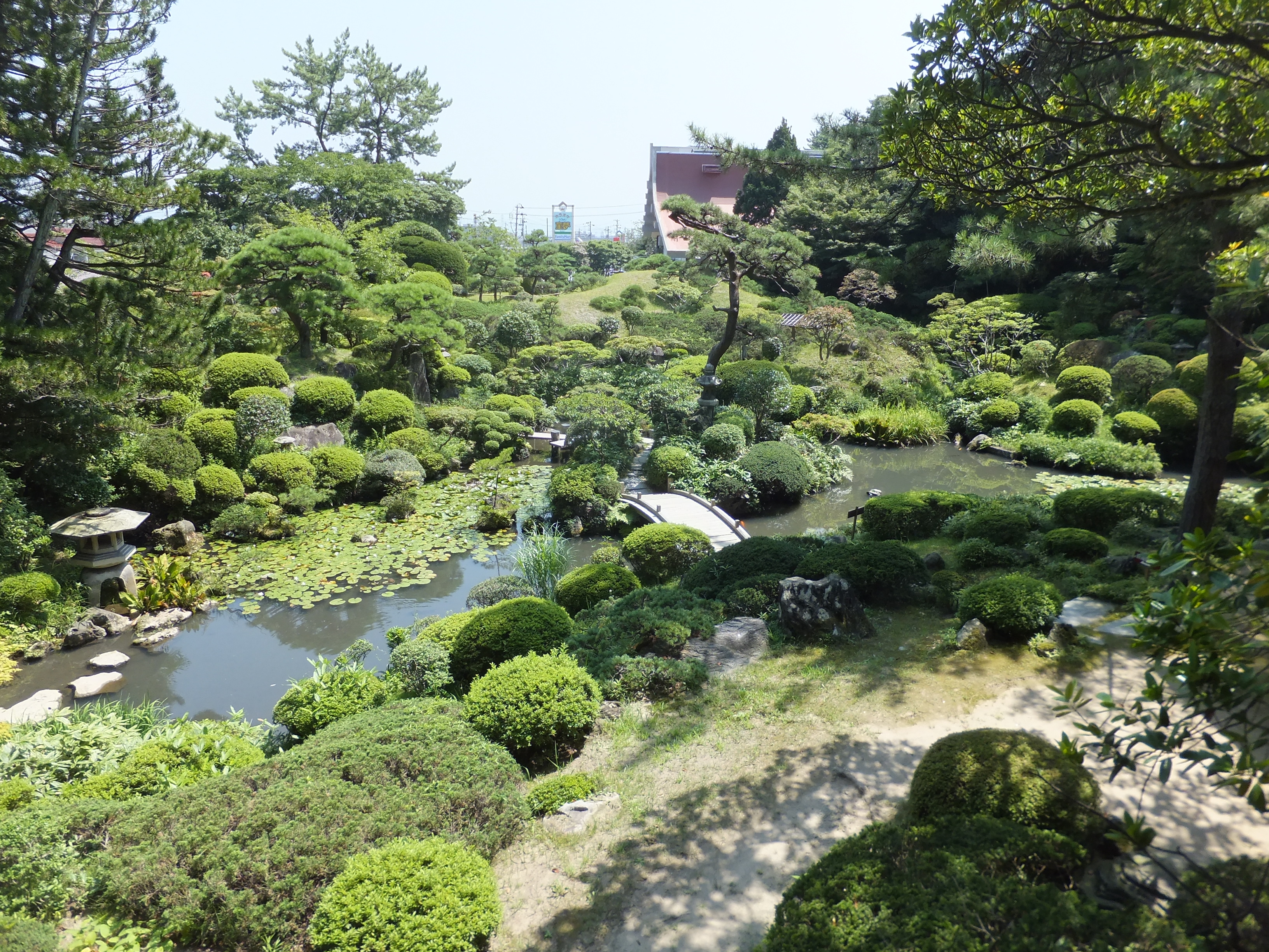 清遠閣とともに築かれた回遊式庭園「鶴舞園」（かくぶえん）。かつては鳥海山を借景としていたが、現在では樹木の成長により鳥海山を見通すことは難しい。2012年、名勝に選定。